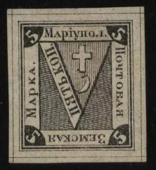 Земская марка Мариупольского уезда номиналом 5 копеек. Мариуполь № 4 по Шмидту и по Чучину. Напечатана в 1875 году на сероватой бумаге